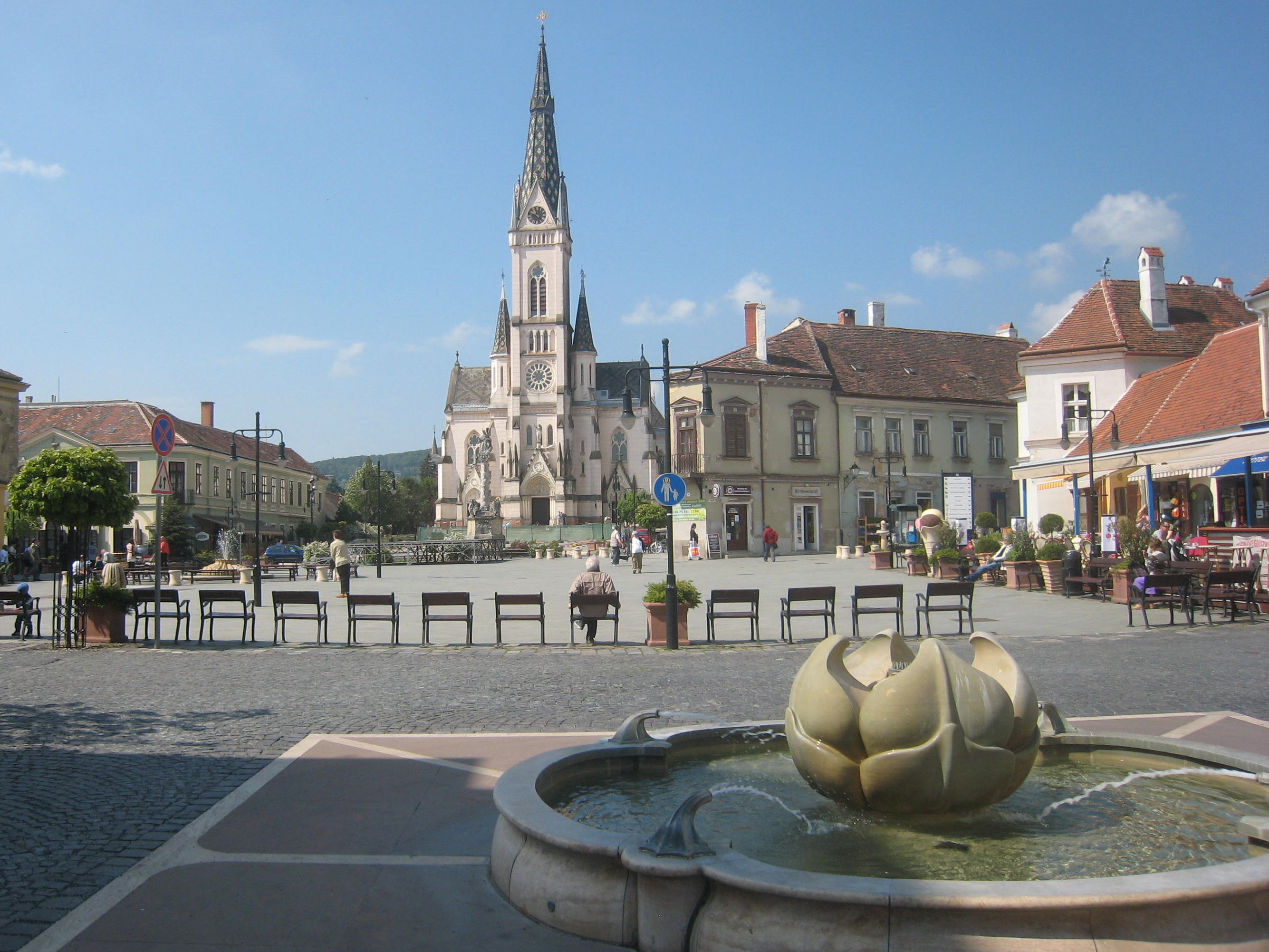 Kiseg, del trga Fö s cerkvijo Srca Jezusovega.